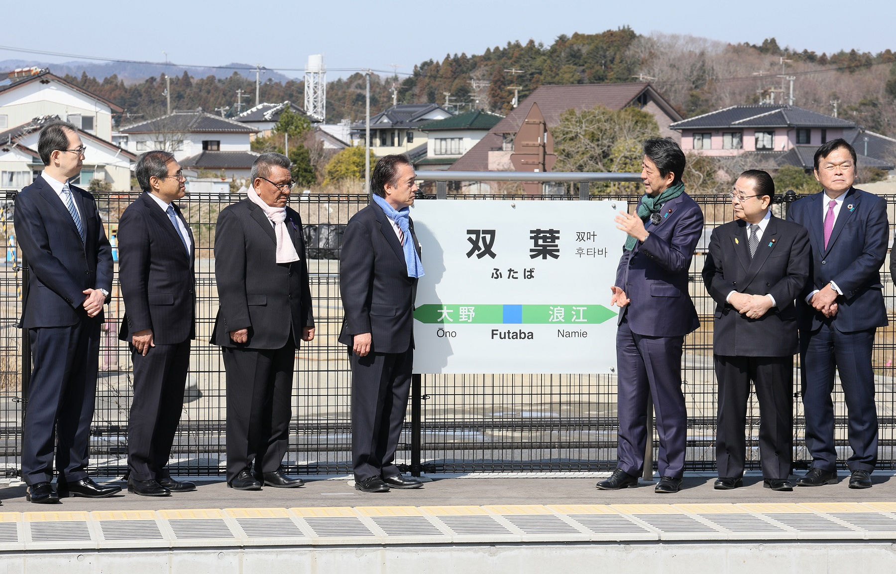 安倍総理による双葉駅視察